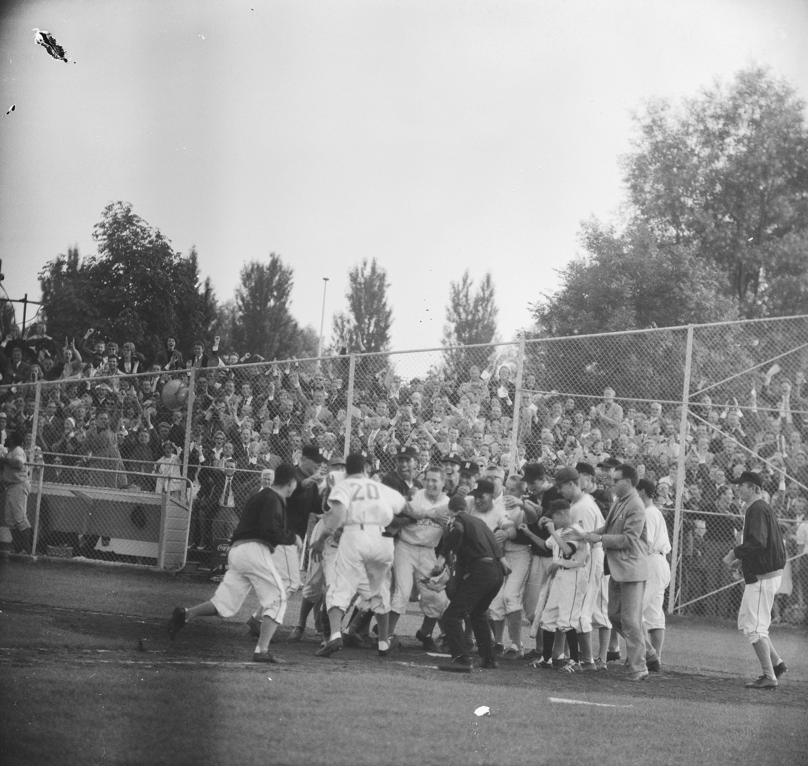 Collectie / Archief : Fotocollectie Anefo Reportage / Serie : [ onbekend ] Beschrijving : Nederland, Europees honkbalkampioen, Arrindel komt binnen Datum : 29 juli 1962 Trefwoorden : honkbal, kampioenen Fotograaf : Nijs, Jac. de / Anefo Auteursrechthebbende : Nationaal Archief Materiaalsoort : Negatief (zwart/wit) Nummer archiefinventaris : bekijk toegang 2.24.01.03 Bestanddeelnummer : 914-1621